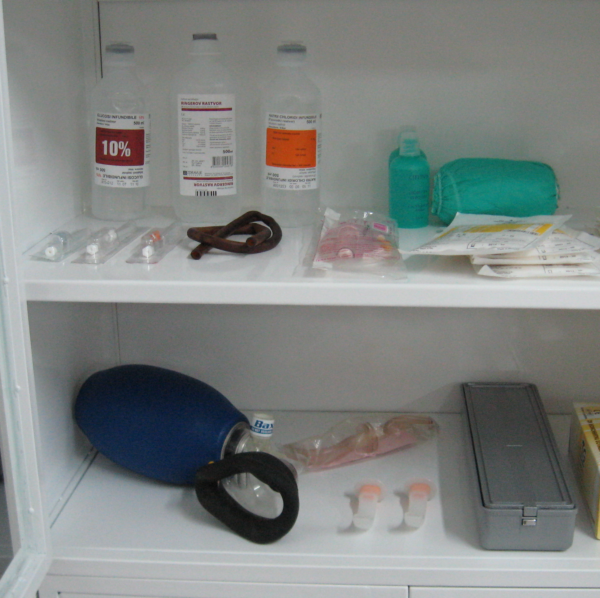 Део комплета за реанимацију у здравственим установама, Аутор др Милорад Димић, Ниш 11.03.2009.